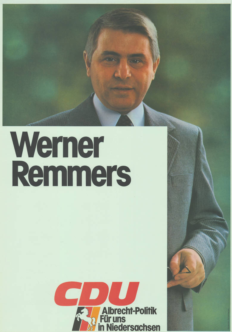 Werner Remmers CDU Albrecht-Politik Für uns in Niedersachsen Abbildung: Foto - Nationalfarben mit Niedersachsenross Plakatart: Kandidaten-/Personenplakat mit Porträt Auftraggeber: Verantw.: CDU Niedersachsen Objekt-Signatur: 10-008 : 410 Bestand: Landtagswahlplakate Niedersachsen (10-008) GliederungBestand10-18: Landtagswahlplakate Niedersachsen (10-008) » CDU Lizenz: KAS/ACDP 10-008 : 410 CC-BY-SA 3.0 DE